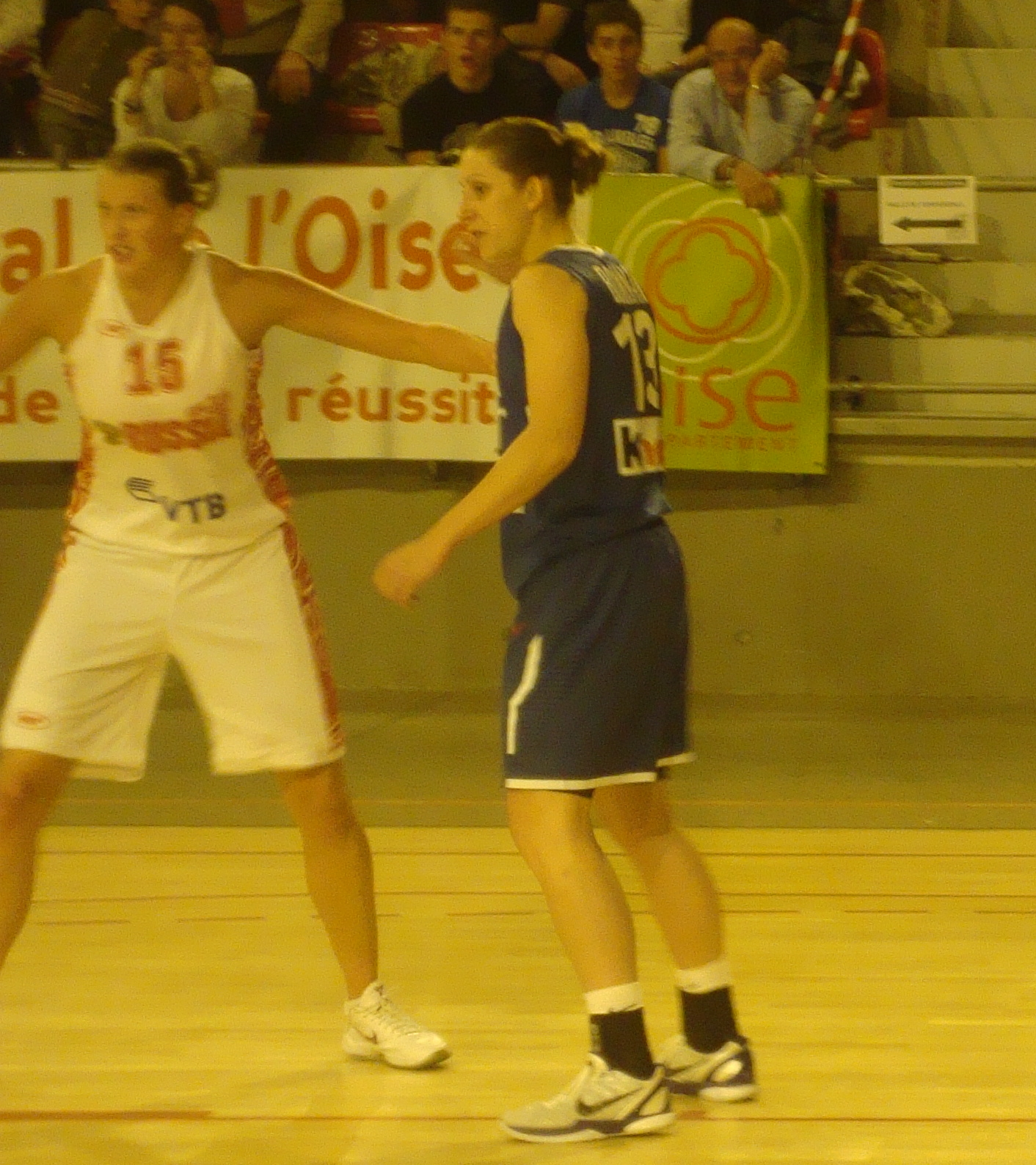 La basketteuse française Aurélie Bonnan